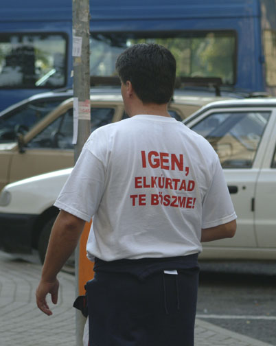 „Yes you screwed it you bonehead!“